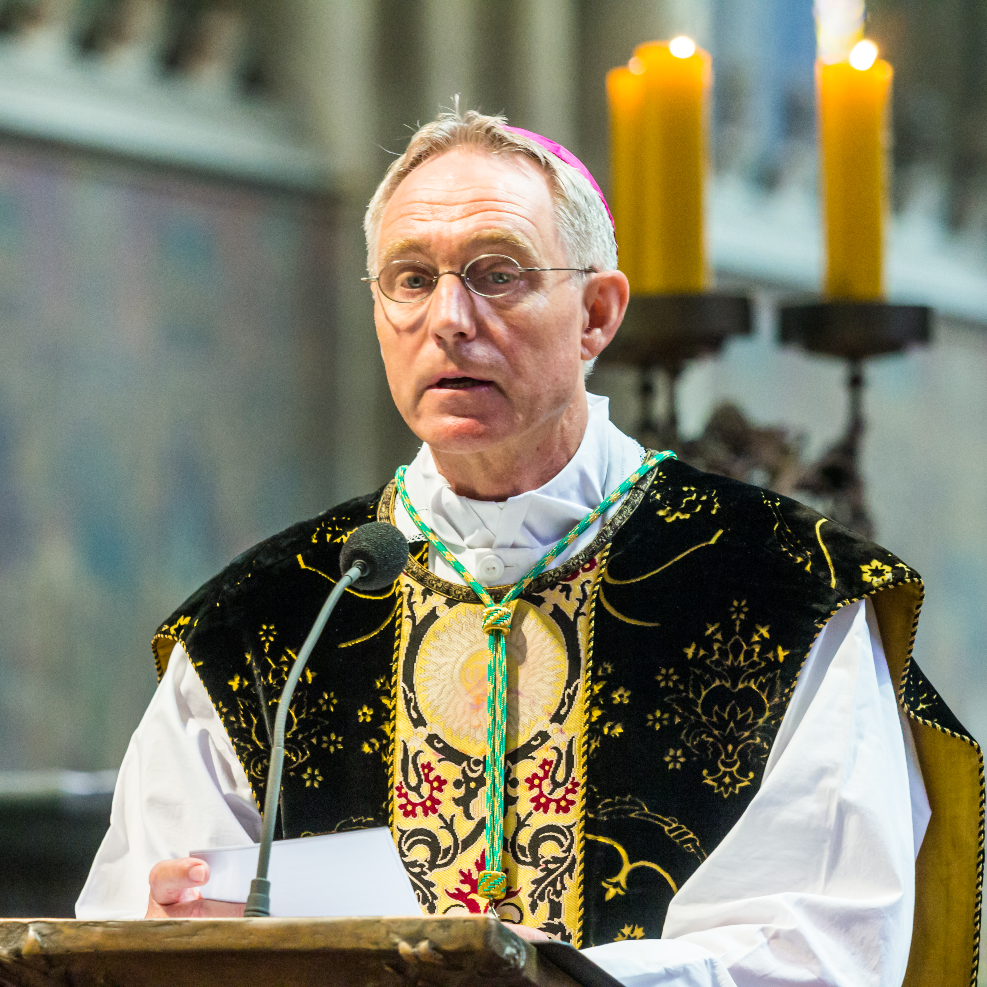 Exsequien Joachim Kardinal em. Meisner Foto: Erzbischof Georg Gänswein, Privatsekretär von Papst Benedikts XVI., trägt eine Würdigung Meisners von Benedikts XVI. vor